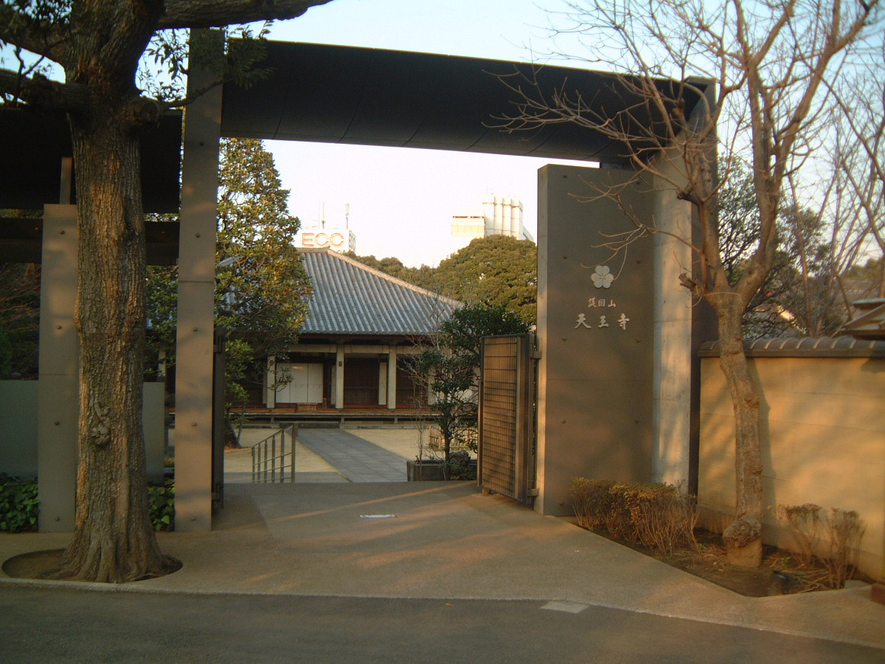 日暮里、天王寺。